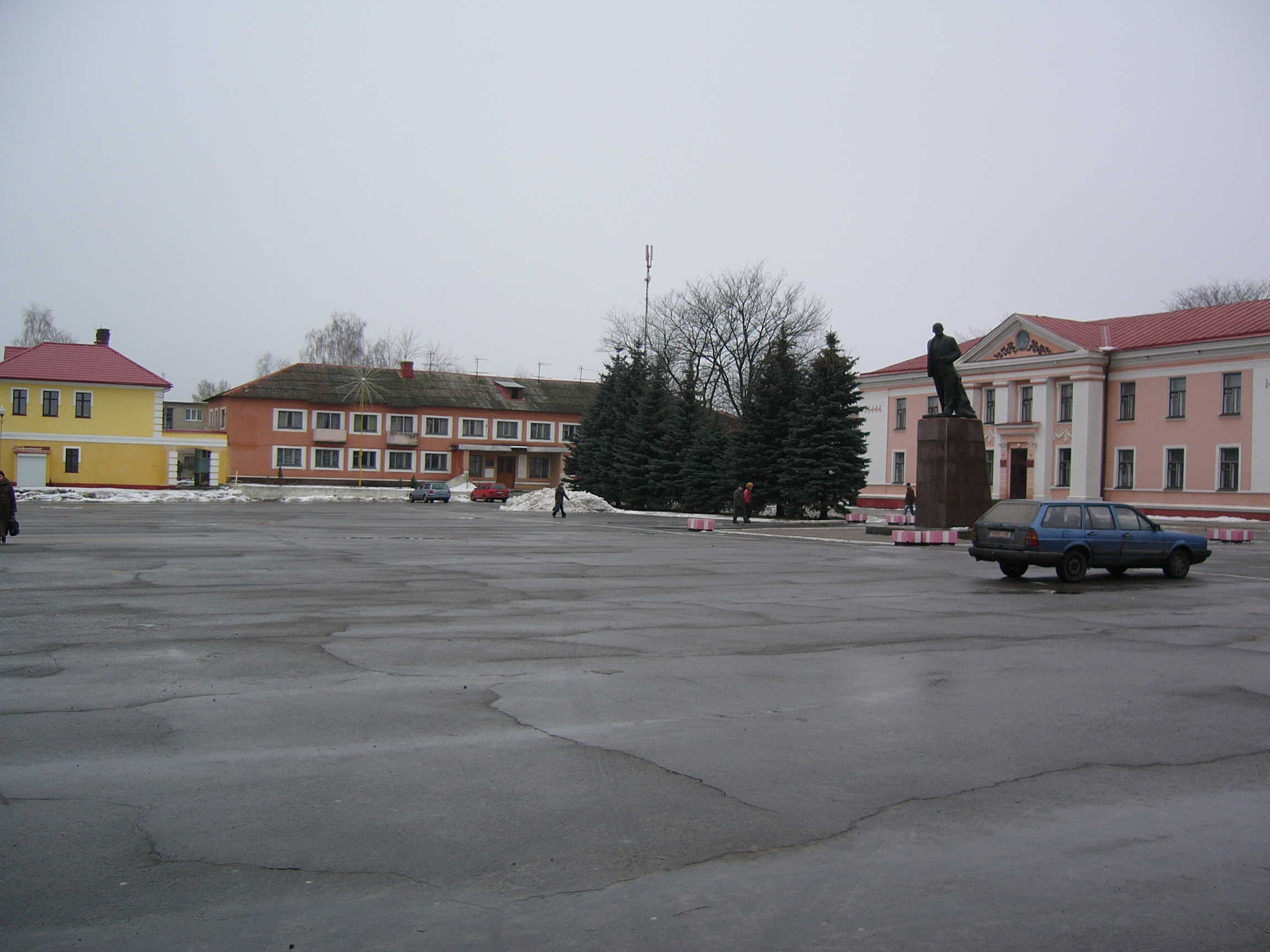 Беларуская (тарашкевіца): Петрыкаў